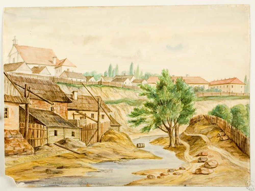 Беларуская (тарашкевіца): Горадня (Horadnia), забудова ўздоўж ракі Гараднічанкі (Haradničanka)